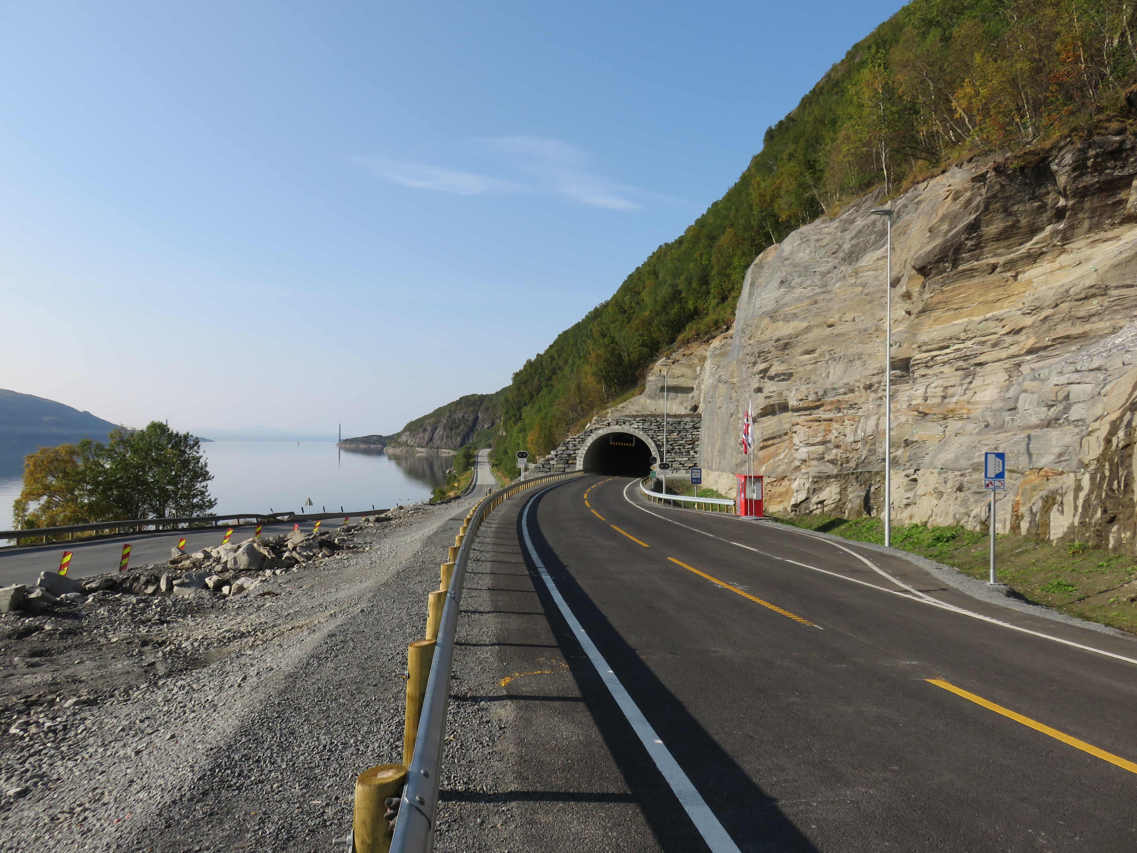 Trældaltunnelen mellom Narvik og Bjerkvik.